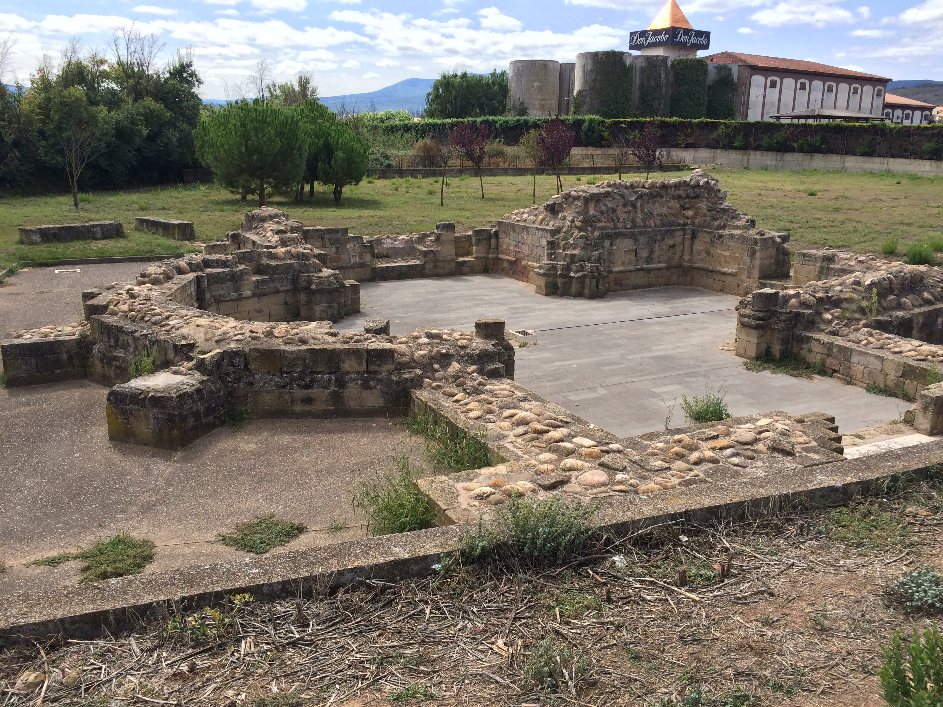 Hospital de San Juan de Acre, Navarrete - La Rioja